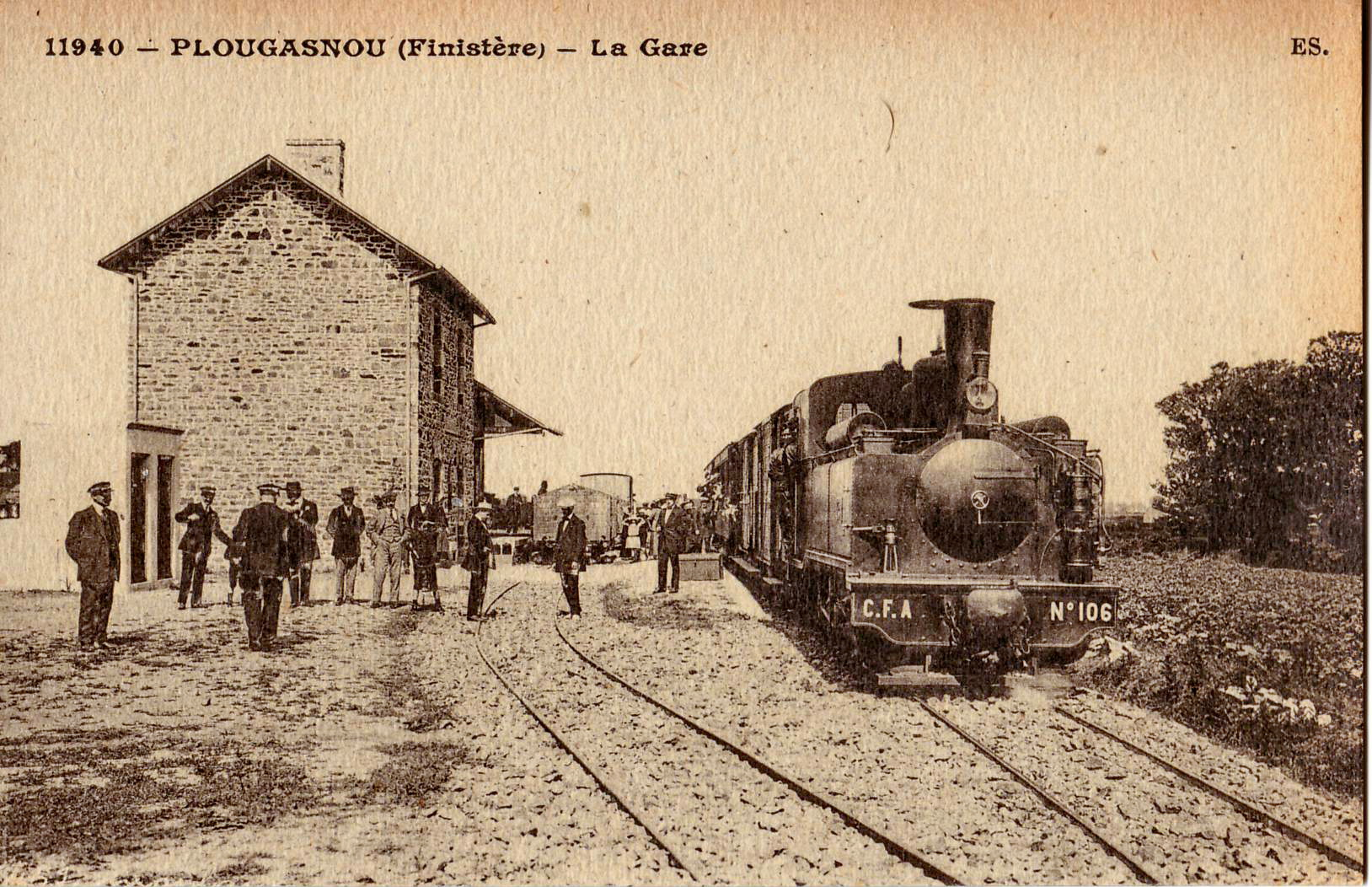 Carte postale ancienne éditée par ES n°11940 PLOUGASNOU - La Gare Vue en gros plan de la locomotive n°106 des CFA, construite par Corpet & Louvet et livrée le 17 juillet 1911 (n° constructeur 1349)